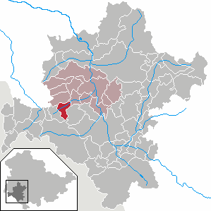 Unterkatz in Thuringia - District Schmalkalden-Meiningen